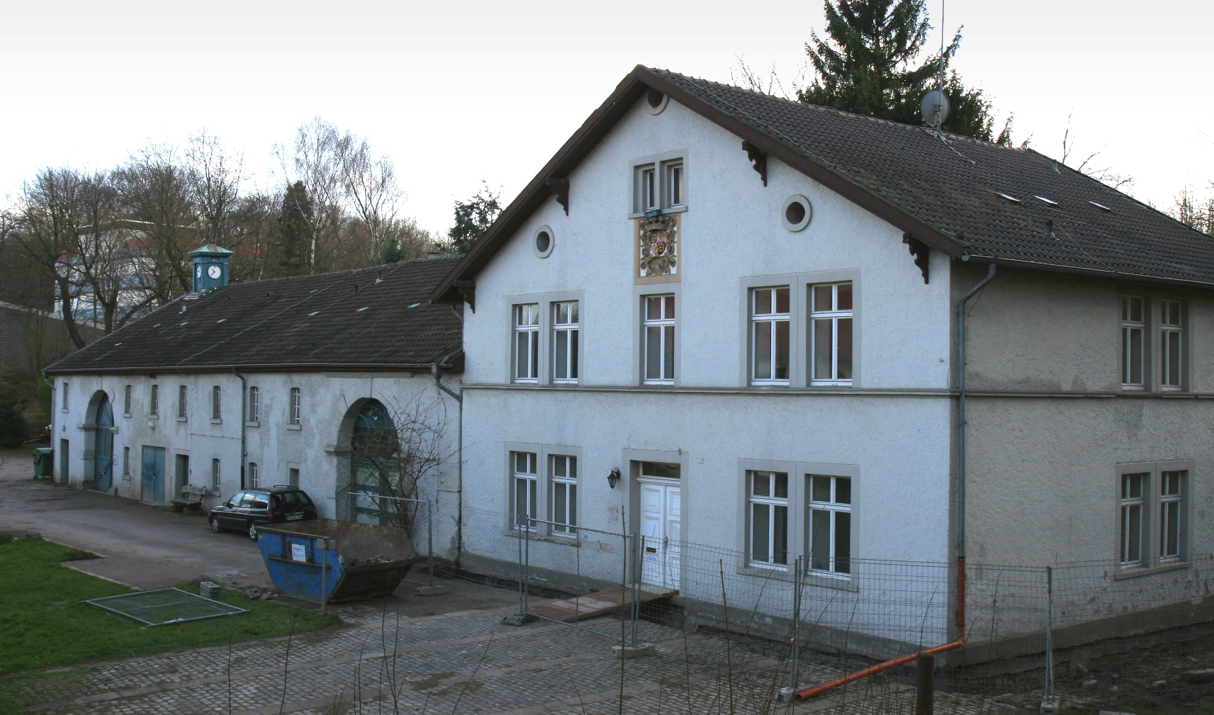 Haus Busch in Hagen.